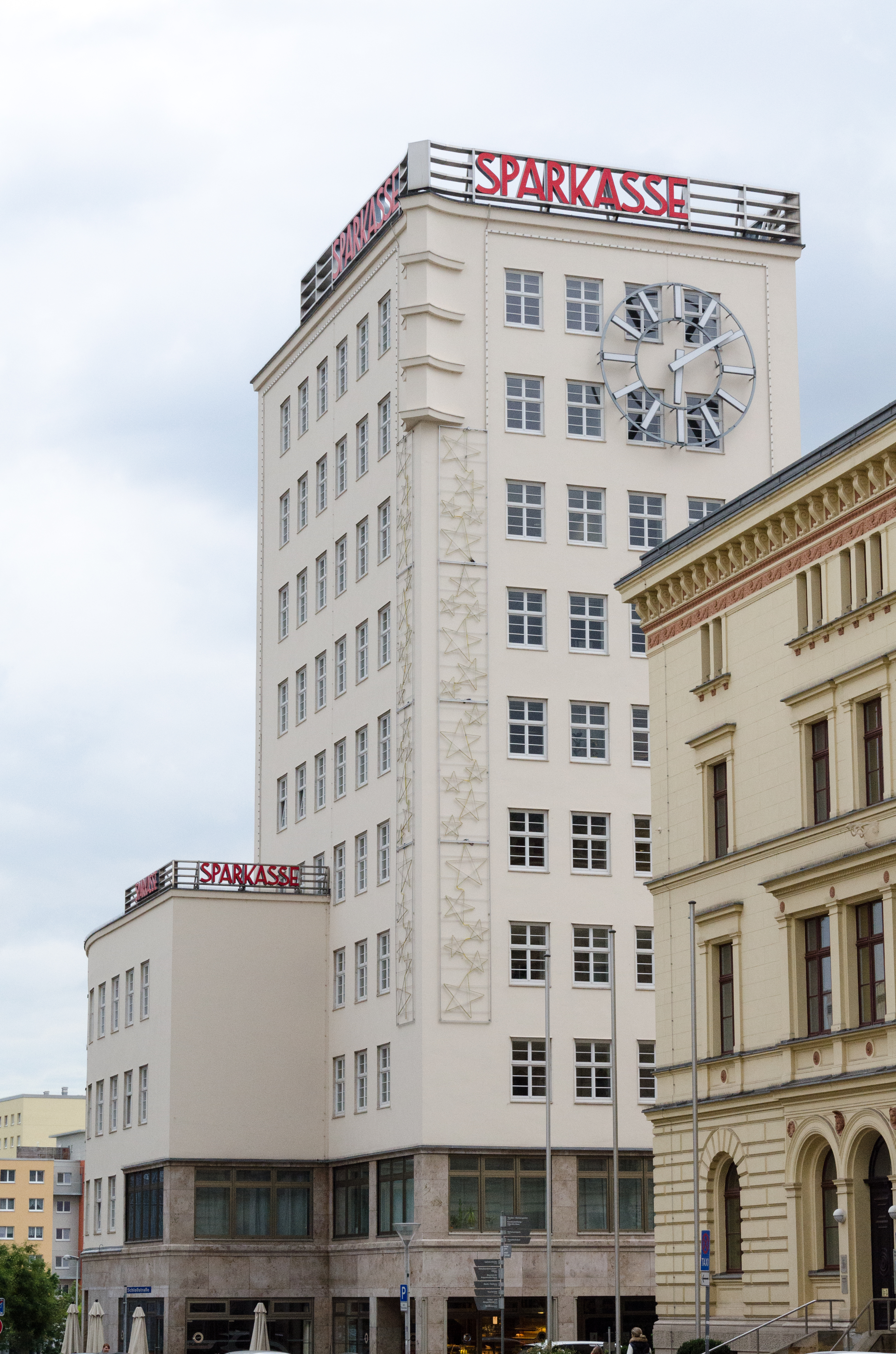 Gera, Schloßstraße 11